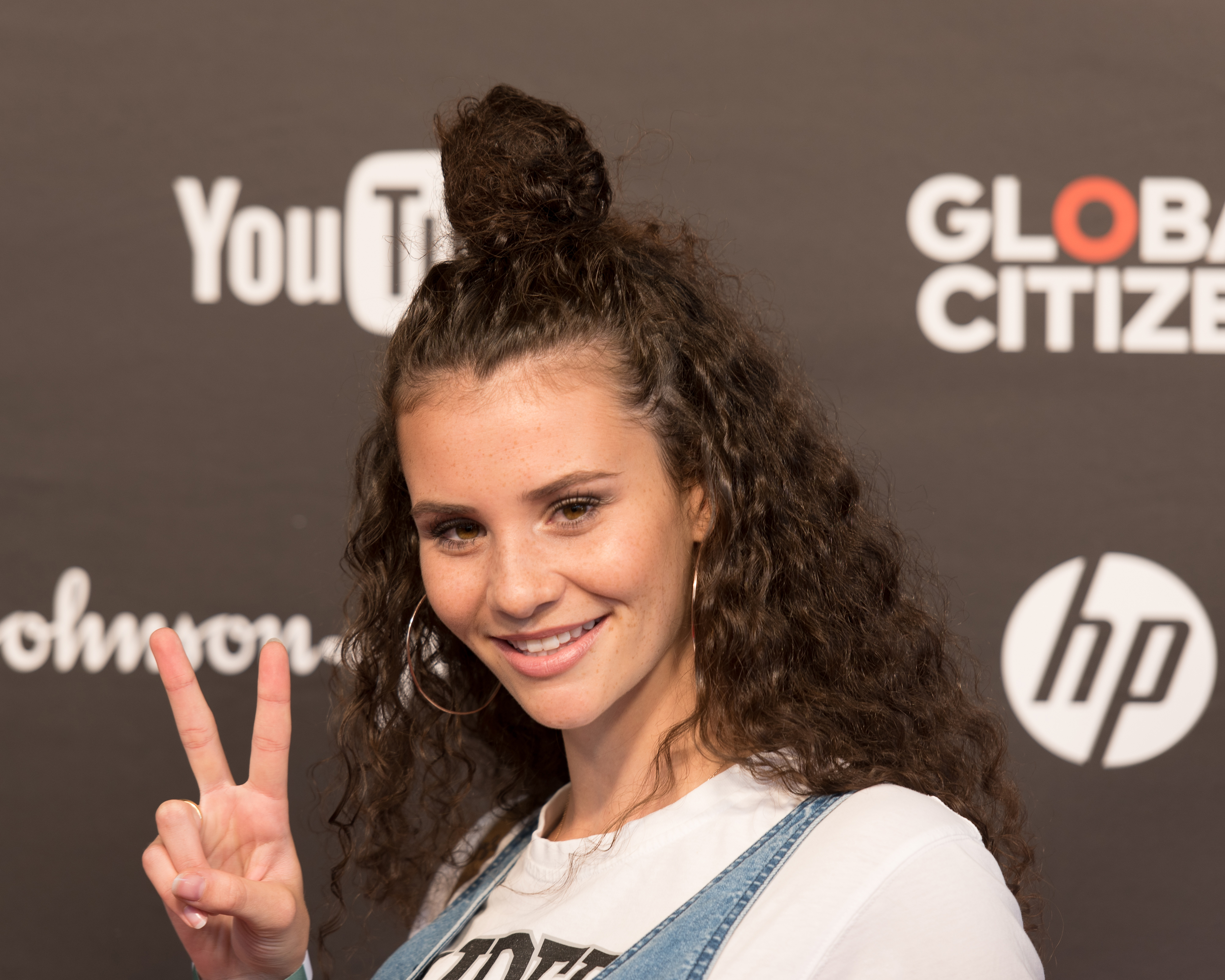 Betty Taube-Guenter beim Global Citizen Festival in Hamburg